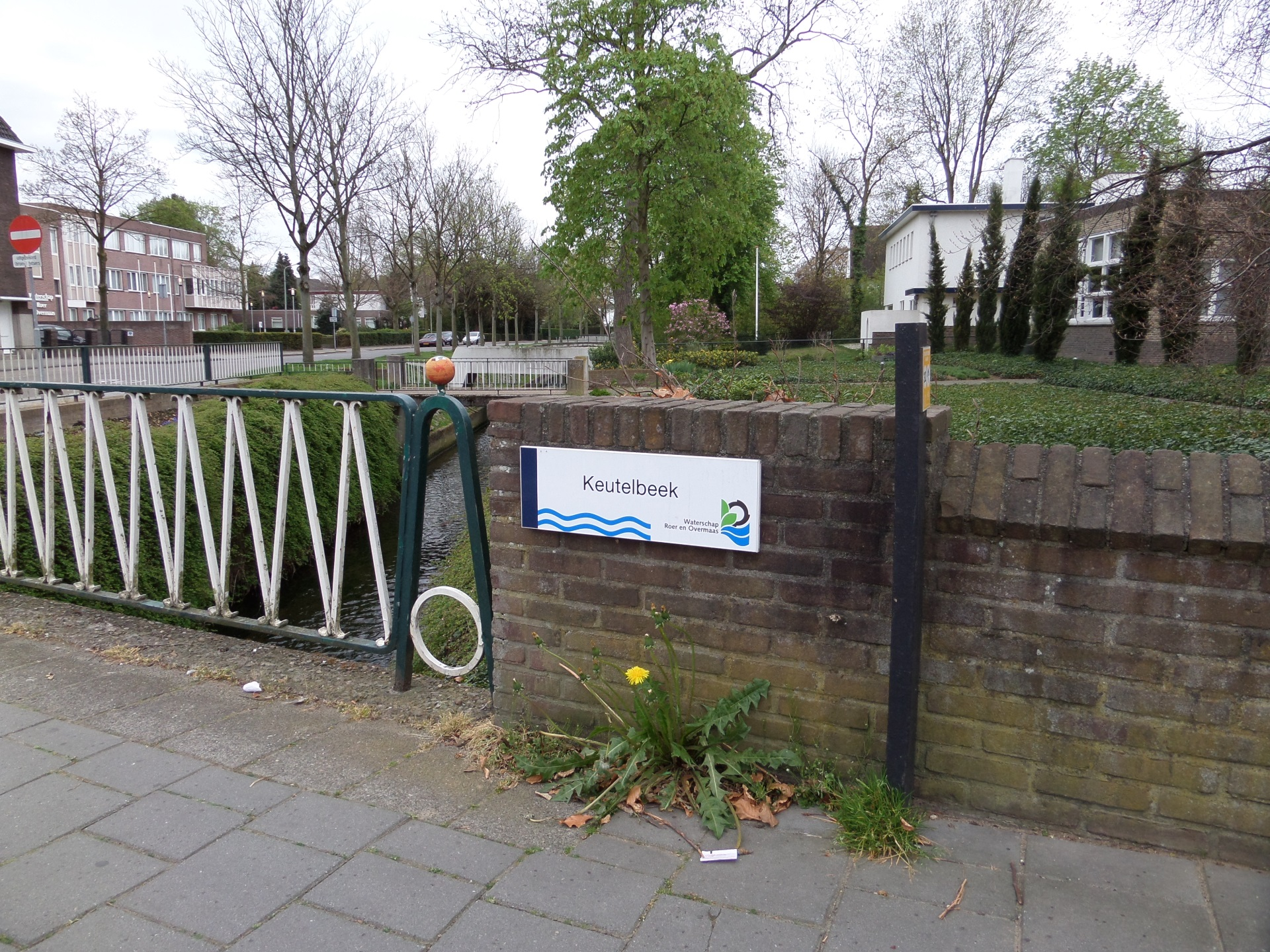 Keutelbeek te Sittard, brug Wilhelminastraat